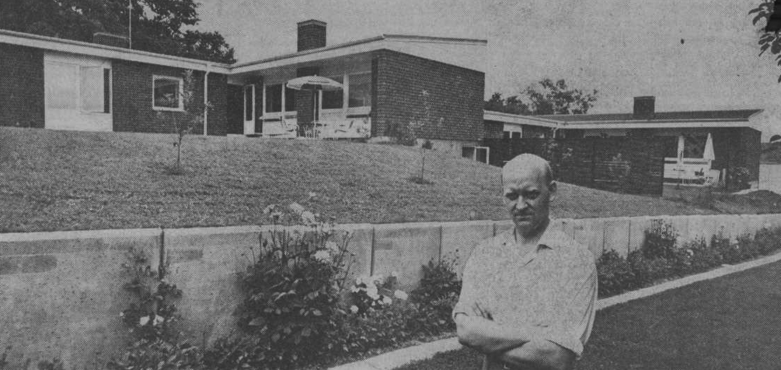 Arkitekten Tomas Warne framför egenritad småhusgrupp i Strängnäs.